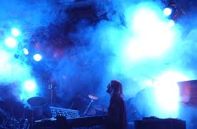 In Concert